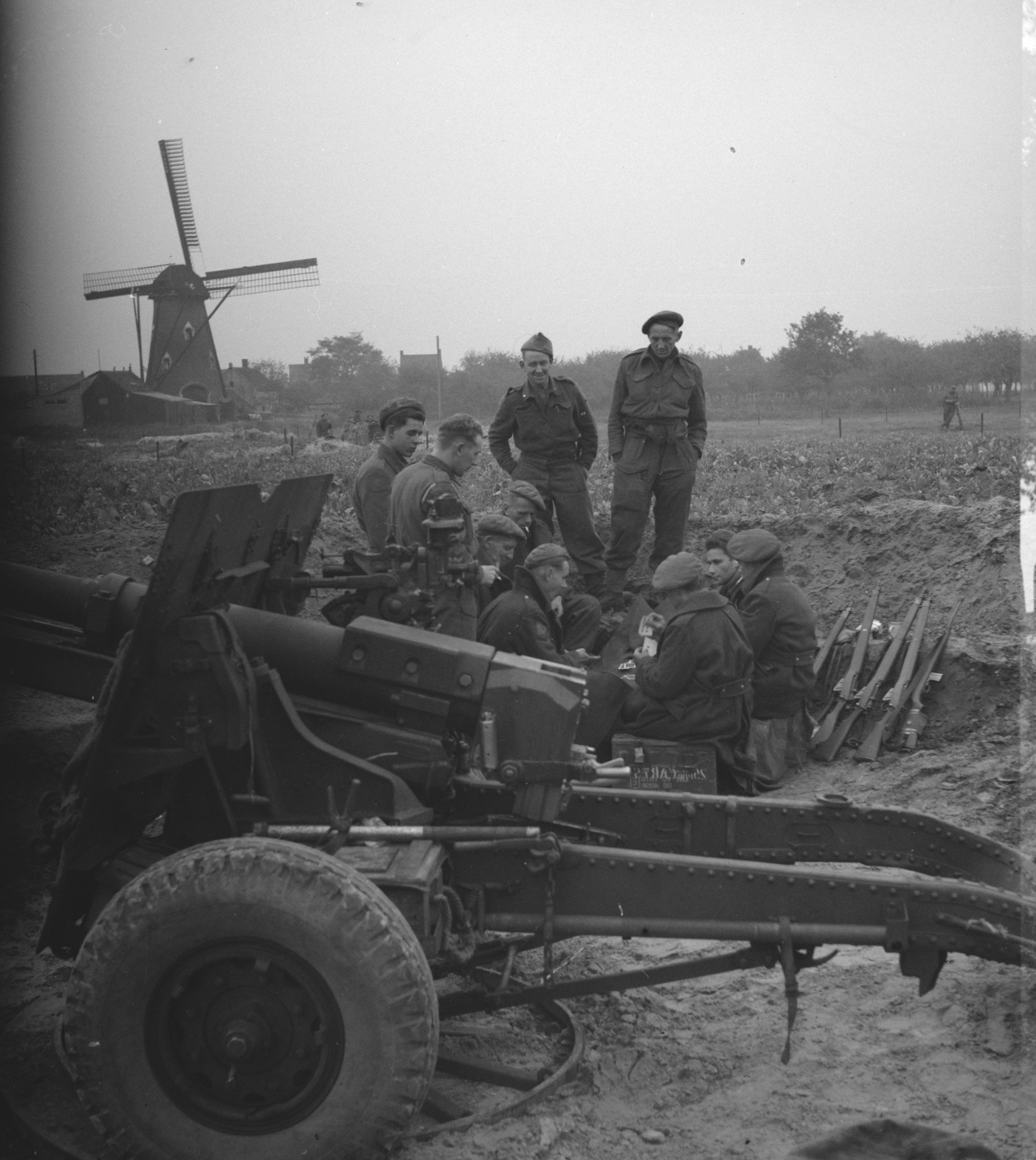 Collectie / Archief : Fotocollectie Anefo Reportage / Serie : [ onbekend ] Beschrijving : Koninkijke Nederlandse Prinses Irene Brigade in Nederland. De weg Tilburg-Breda.[Tijdens een gevechtspauze. In de voorgrond een kanon, in de achtergrond een molen] Datum : november 1944 Locatie : Noord-Brabant, Tilburg Trefwoorden : bevrijding, leger, soldaten, tweede wereldoorlog Instellingsnaam : Prinses Irene Brigade Fotograaf : Onbekend / Publiek Domein, [onbekend] Auteursrechthebbende : Nationaal Archief Materiaalsoort : Negatief (zwart/wit) Nummer archiefinventaris : bekijk toegang 2.24.01.03 Bestanddeelnummer : 934-9729